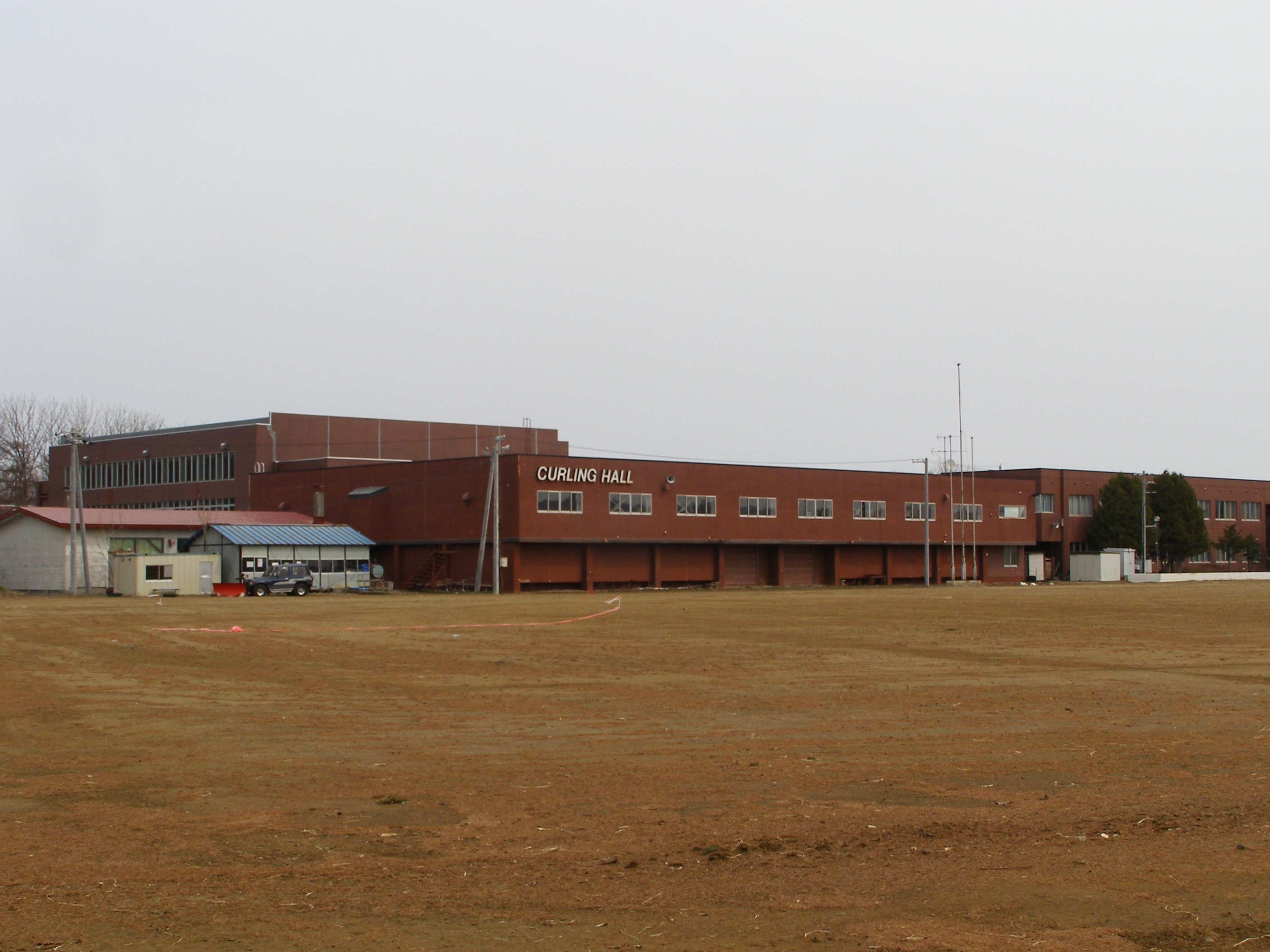 常呂町営（現：北見市営）カーリングホール外観